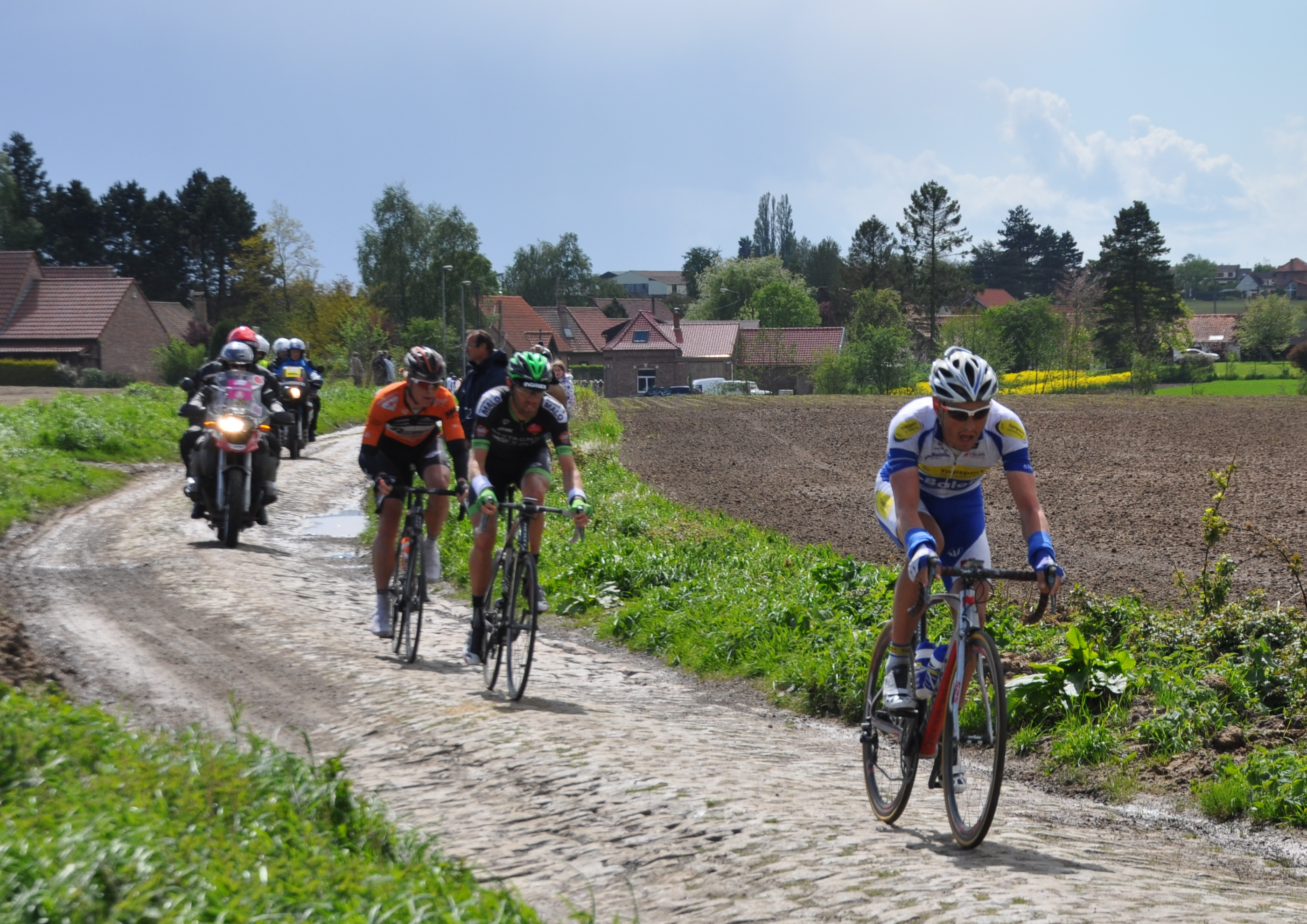 Echappée de la première étape, sur les pavés de Mons en Pévèle, lors des 4 jours de Dunkerque 2015